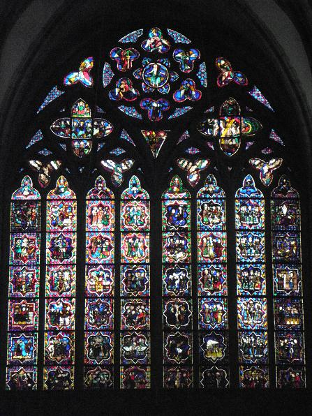 Maîtresse-Vitre du Chœur de la Cathédrale Saint-Samson de Dol (35)